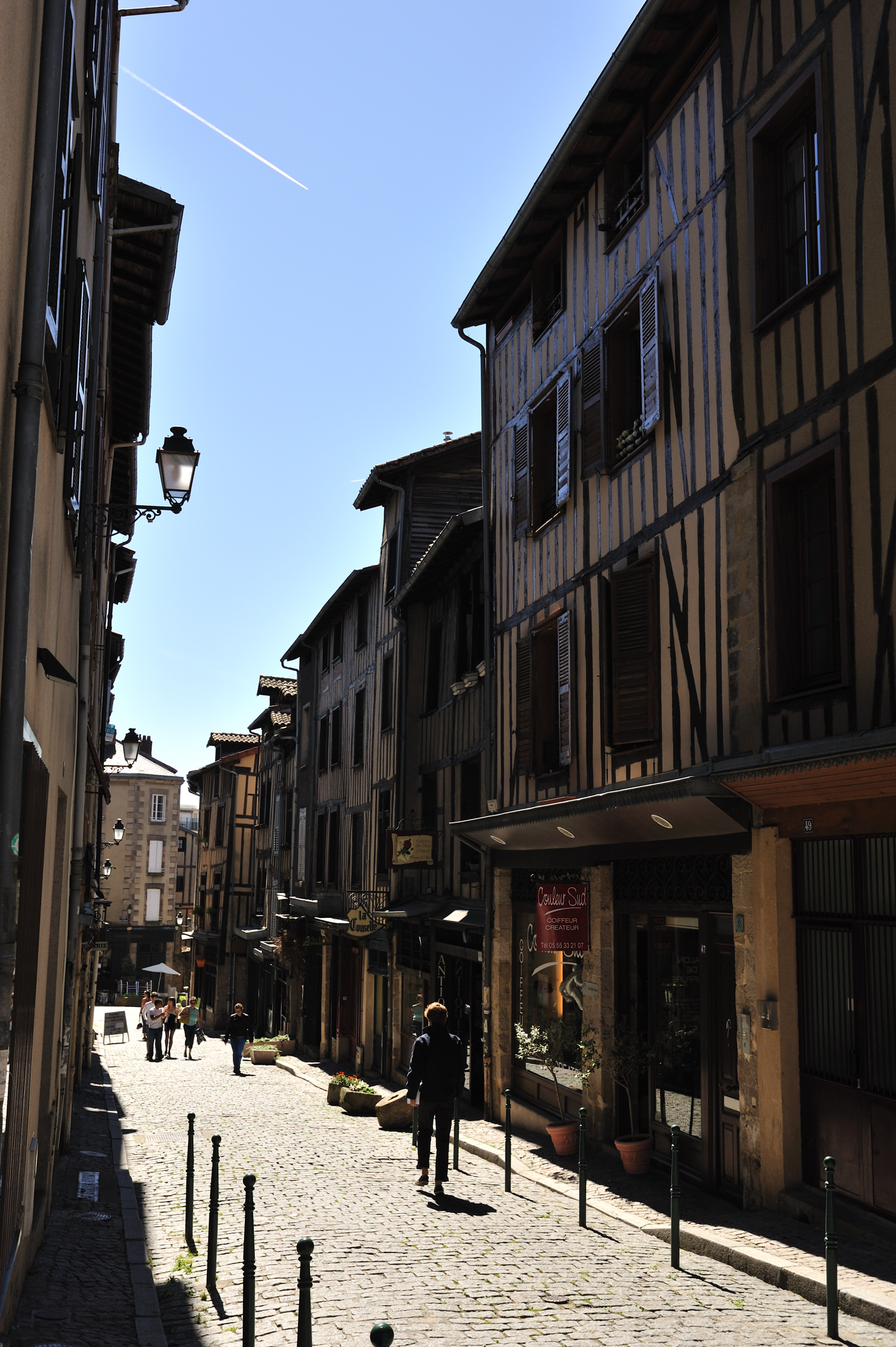 Rue de la Boucherie à Limoges (Haute-Vienne, France).